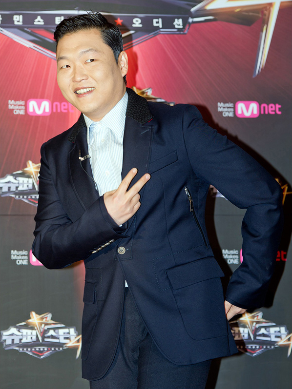 싸이. CJ E&M 엠넷 슈퍼스타K 시즌4 제작발표회에서